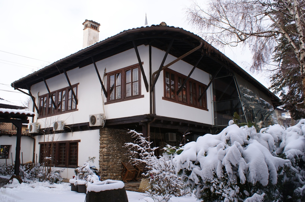 Shtepi banimi (ish Akademia e Shkencave dhe e Arteve e Kosovës)